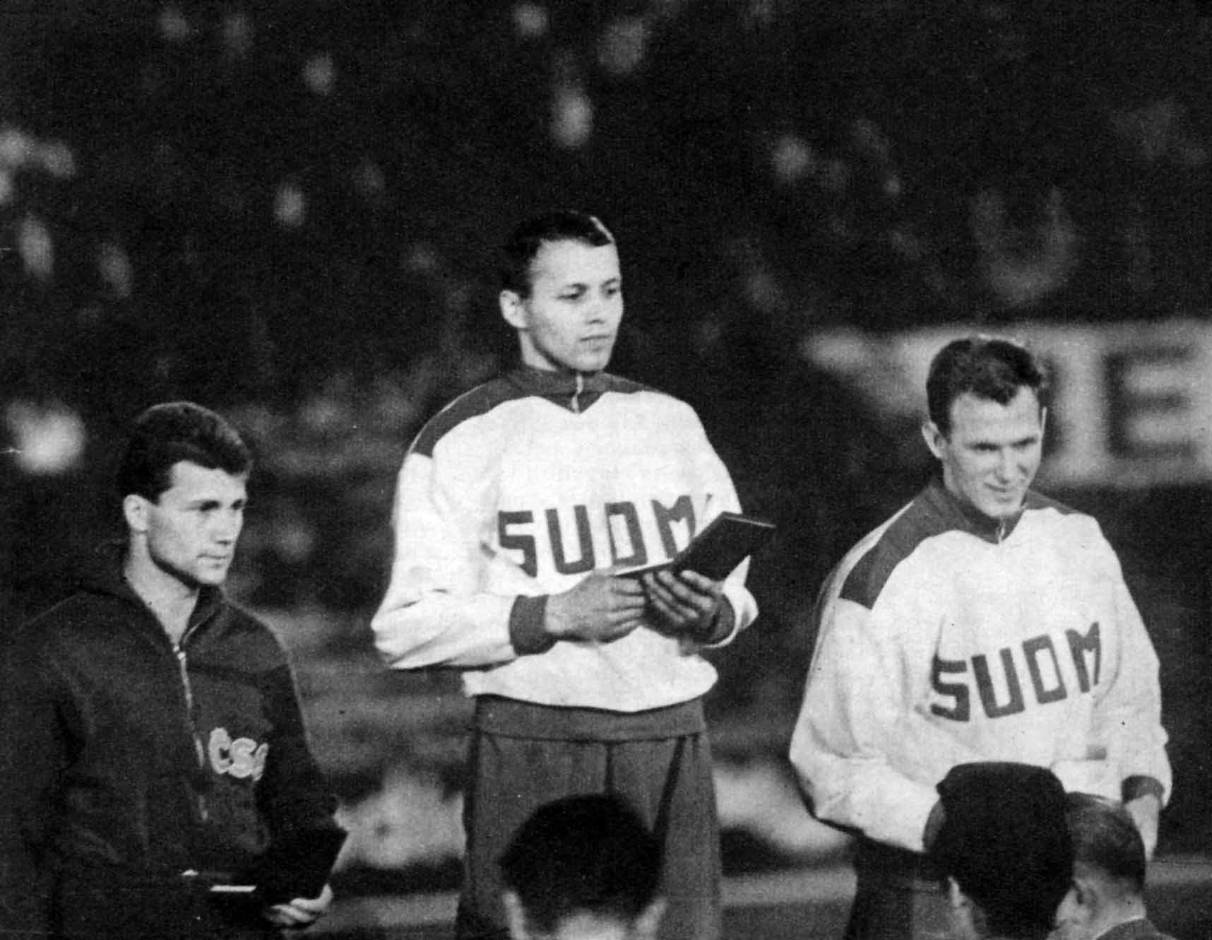 EM-kisojen palkintojenjako Belgradissa 1962. Vasemmalla Rudolf Tomášek keskellä Pentti Nikula ja oikealla Kauko Nyström